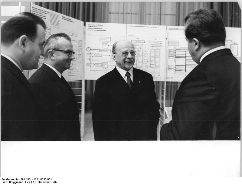 Zentralbild Brüggmann 11.12.1969 Berlin: Ausstellung zum Beschluß des Staatsrates der DDR. Im Anschluss an die Sitzung des Staatsrates der DDR vom 12.12.69 informierte sich der Erste Sekretär des ZK der SED und Vorsitzende des Staatsrates der DDR, Walter Ulbricht (m.) über die Ausstellung. Dr. Herbert Graf (l.), dem Stellvertreter des Ministers für Finanzen der DDR Helmut Sandig (2.v.l.) und dem Stellvertreter des Vorsitzenden der Staatlichen Plankommission der DDR Richard Müller (r.) begleitet.